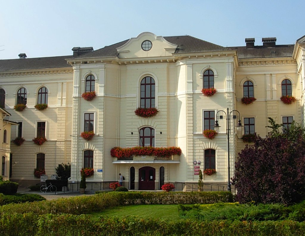 Budynek ratusza w Bydgoszczy, dawne kolegium jezuitów (1644-1653)